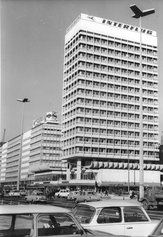 ADN-ZB-Link-27.10.71-ill-Berlin: Ein weiterer "Riese" im Stadtzentrum wurde am 26.10.71 seiner Bestimmung übergeben. In dem Hochhaus sind unter anderem das Reisebüro der DDR und die Interflug untergebracht."